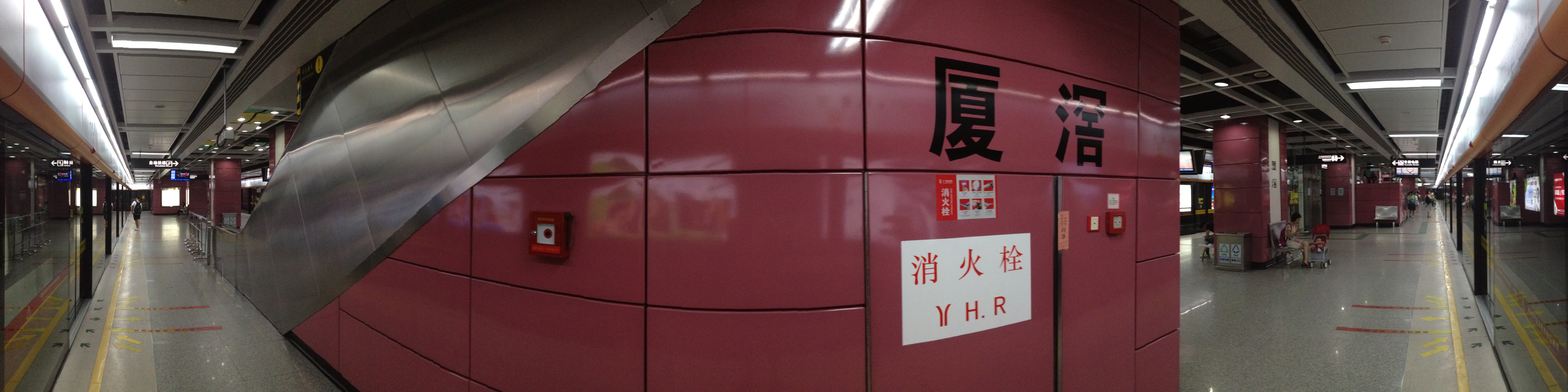 广州地铁厦滘站月台全景图